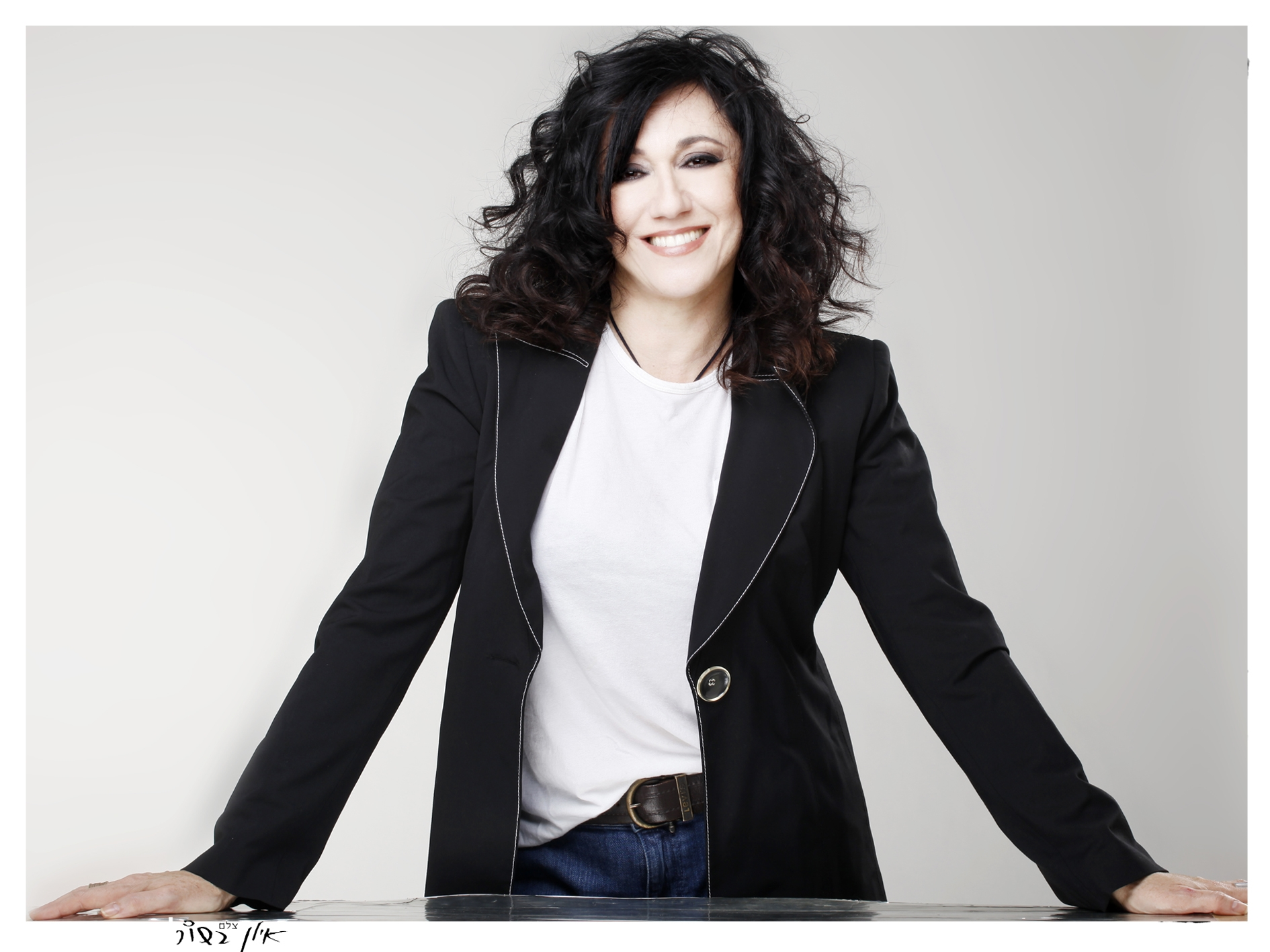 שלומית אהרון